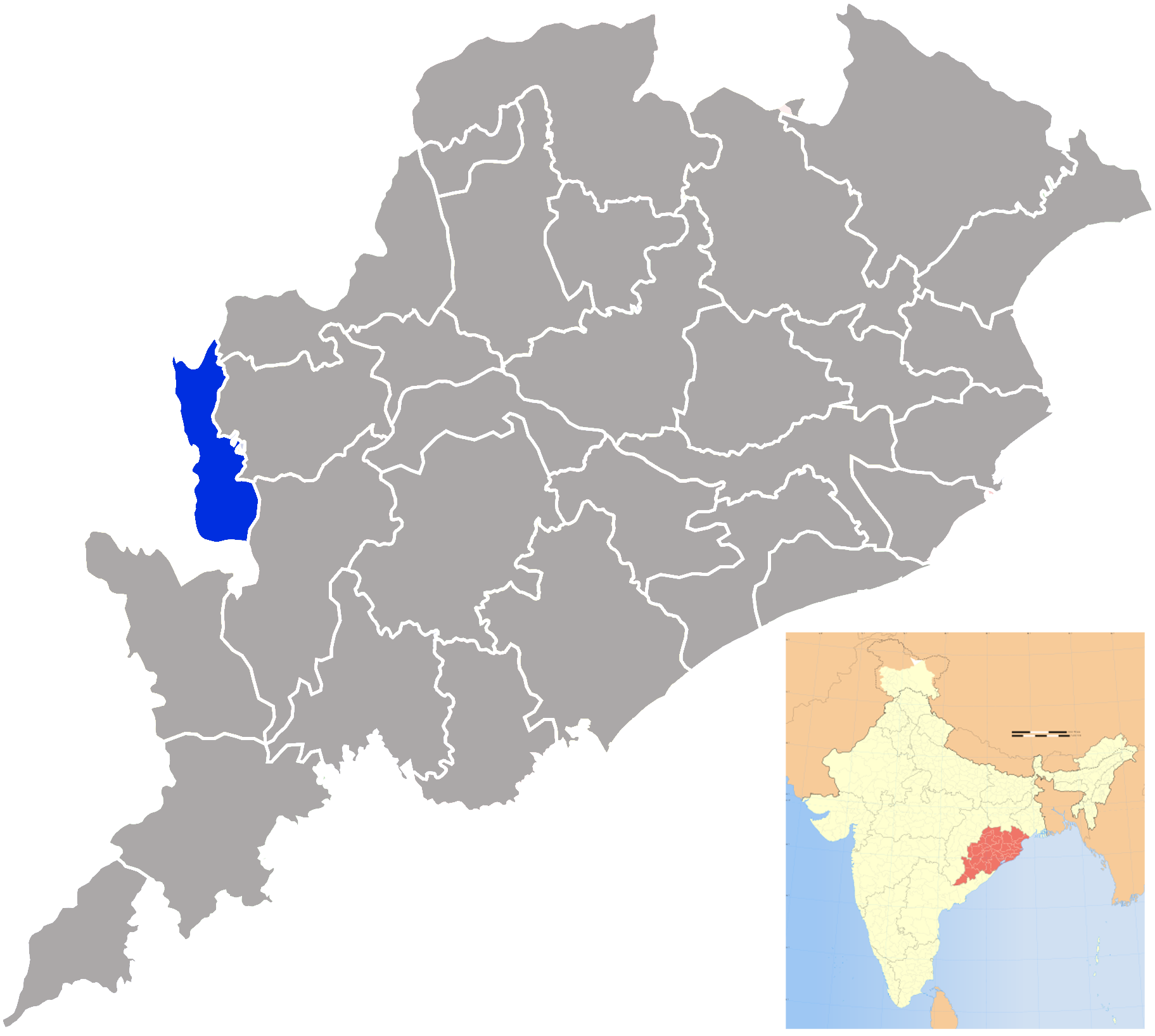 Distrito de Nuapada en Orissa